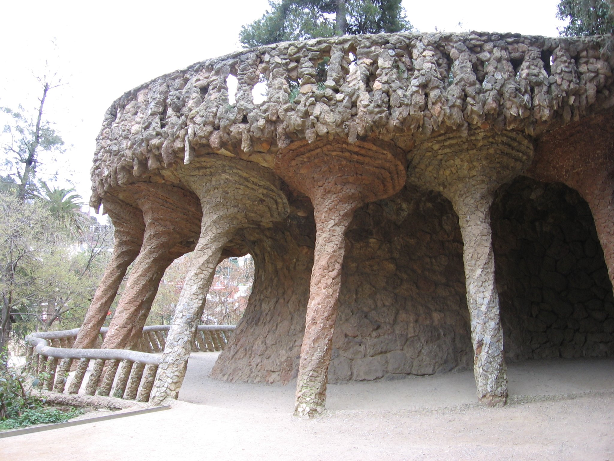 Parque Güell (Barcelona), de Antoni Gaudí